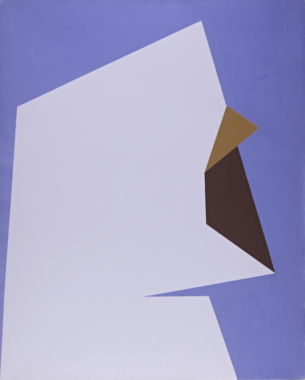 Mutino, Öl auf Hartfaser